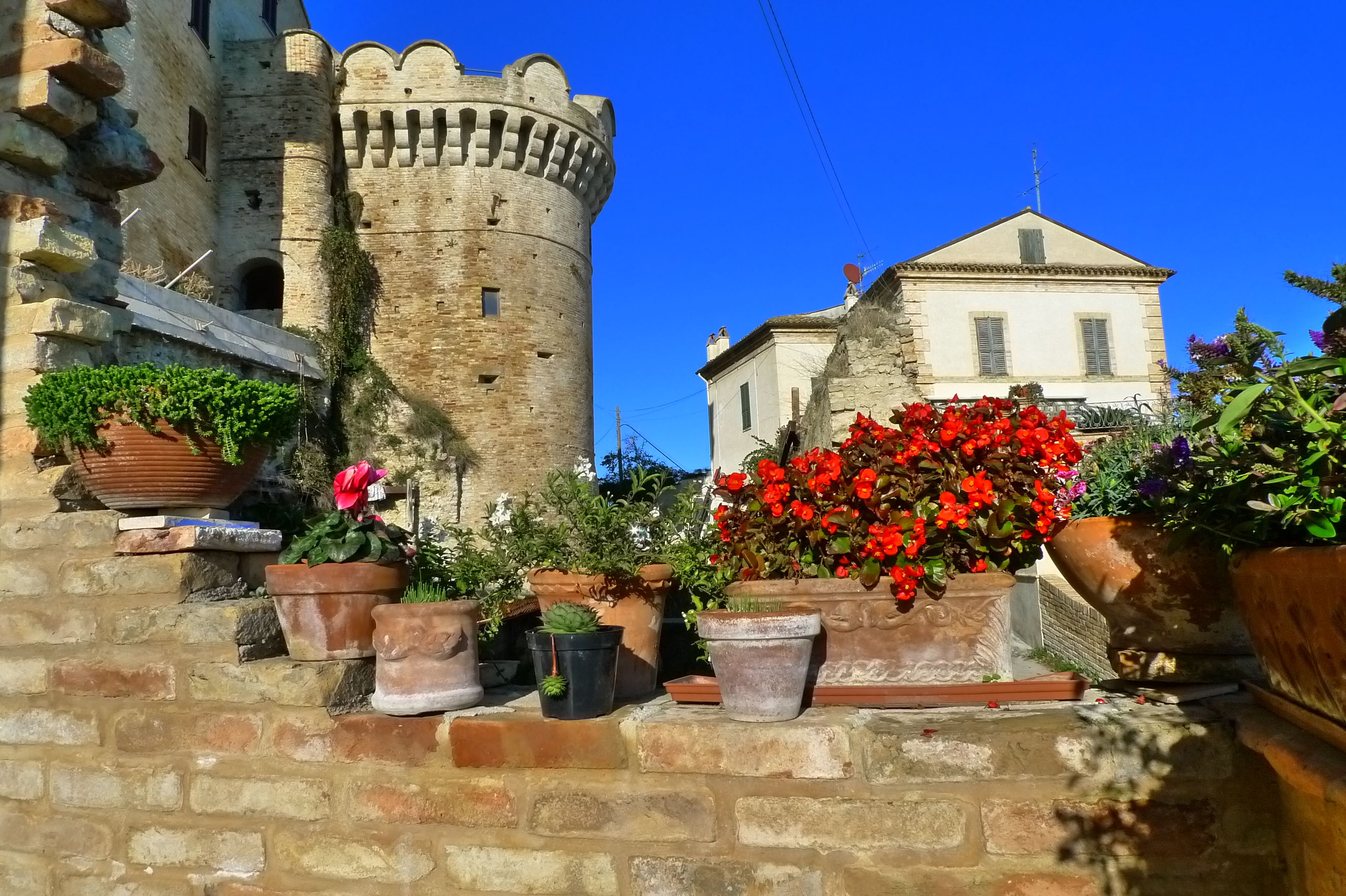 Grottammare, Torrione della Battaglia